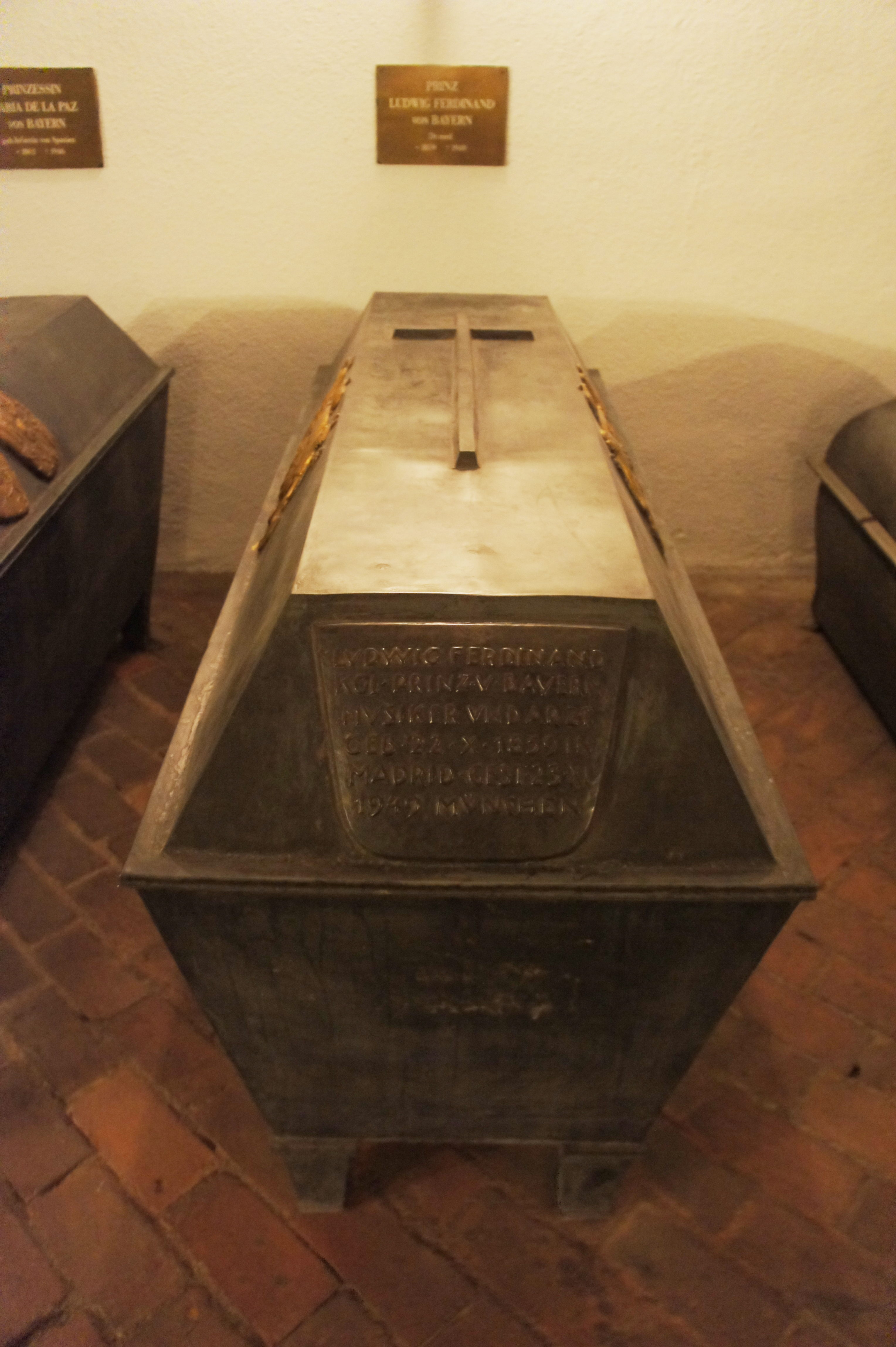 Prinz Ludwig Ferdinand (22. Oktober 1859 – 23. November 1949) (Sohn von Prinz Adalbert Wilhelm). Sarkophag in der Grablege der Wittelsbacher in der St. Michael Kirche in München.